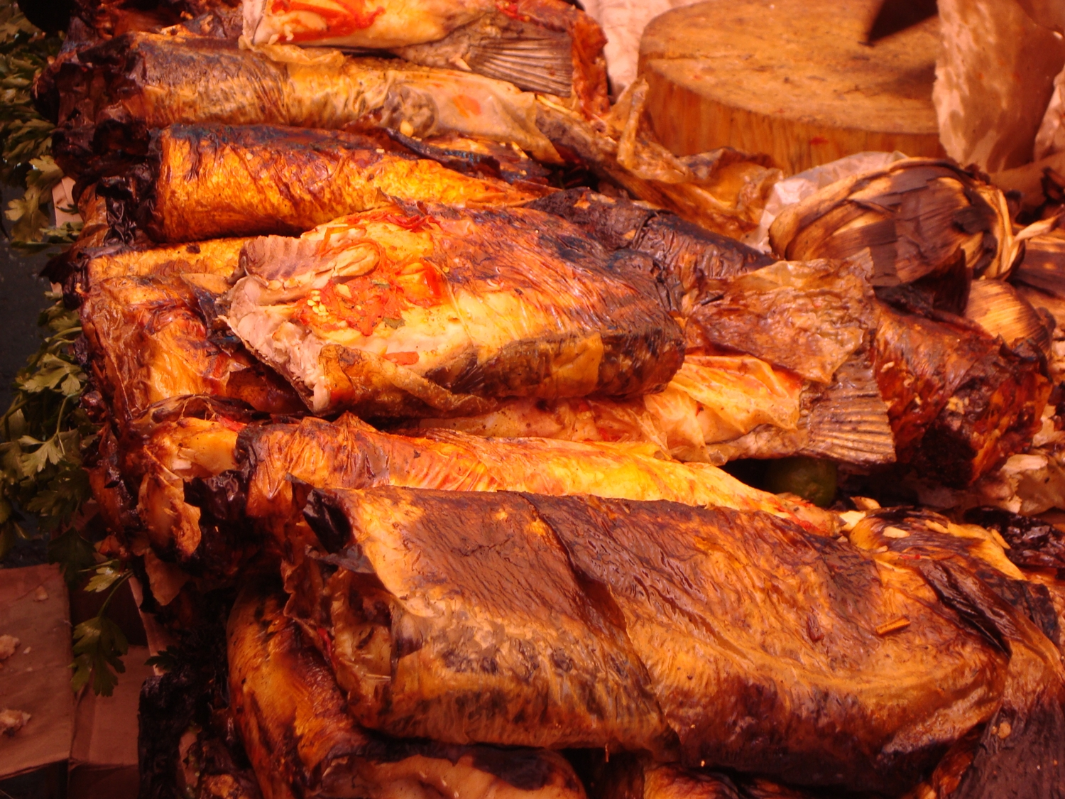 Pescado en mixiote en un puesto de feria en Iztapalapa (México). Esta especialidad es propia de la semana santa.